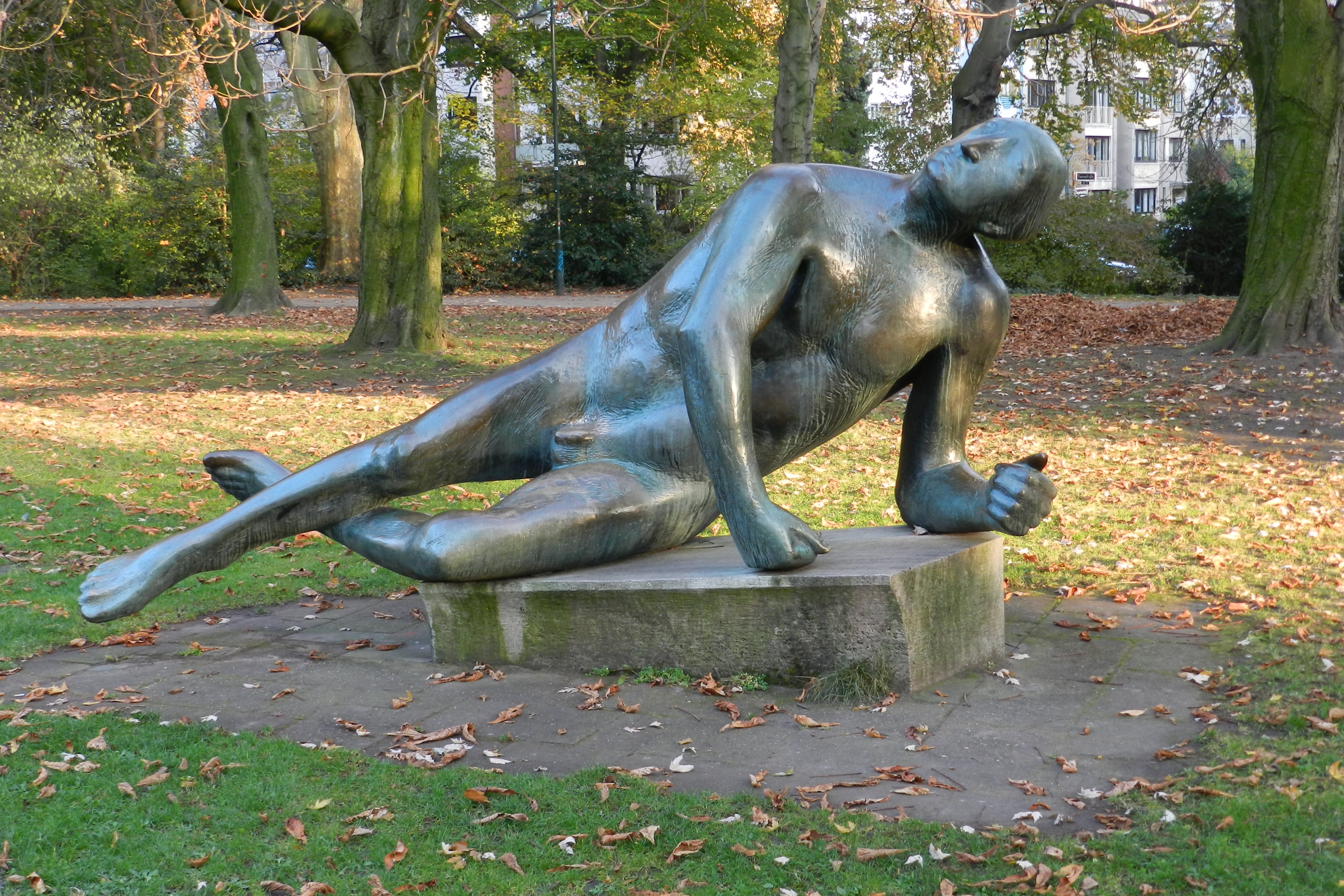 Liegender Mann - Bronze Statue von Kurt-Wolf von Borries im Düsseldorfer Zoopark